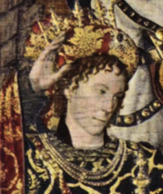 detall de la imatge Taula del Retaule del Conestable o de l'Epifania (1464-1465) per a la Capella del Palau Reial Major de Barcelona.